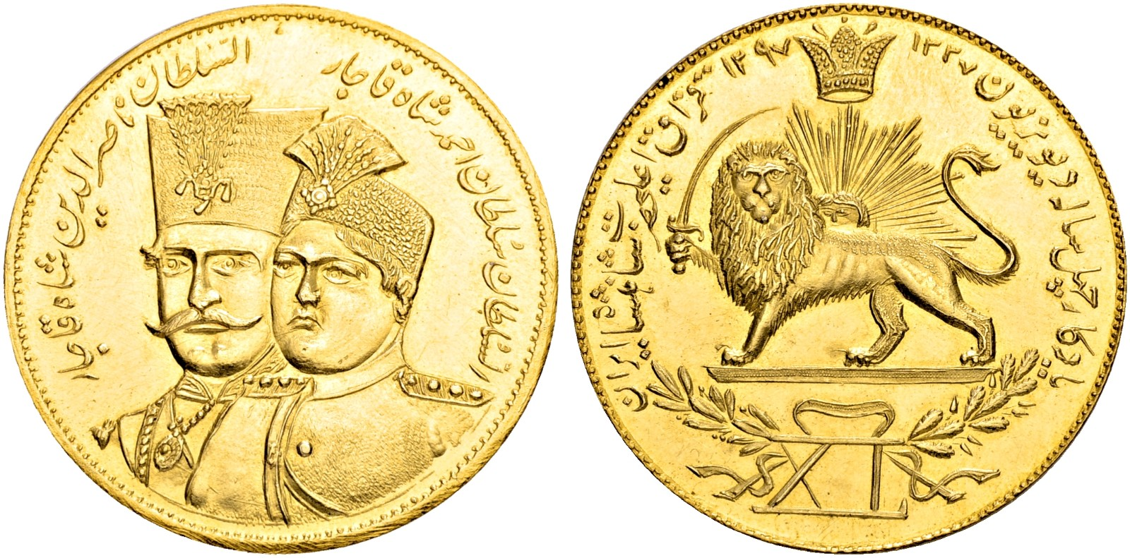 مدال طلای بریگاد کزاک به مناسبت چهلمین سال تشکیل قوای بریگاد کزاک با وزنی معادل سکه ده تومانی (29/42 گرم)